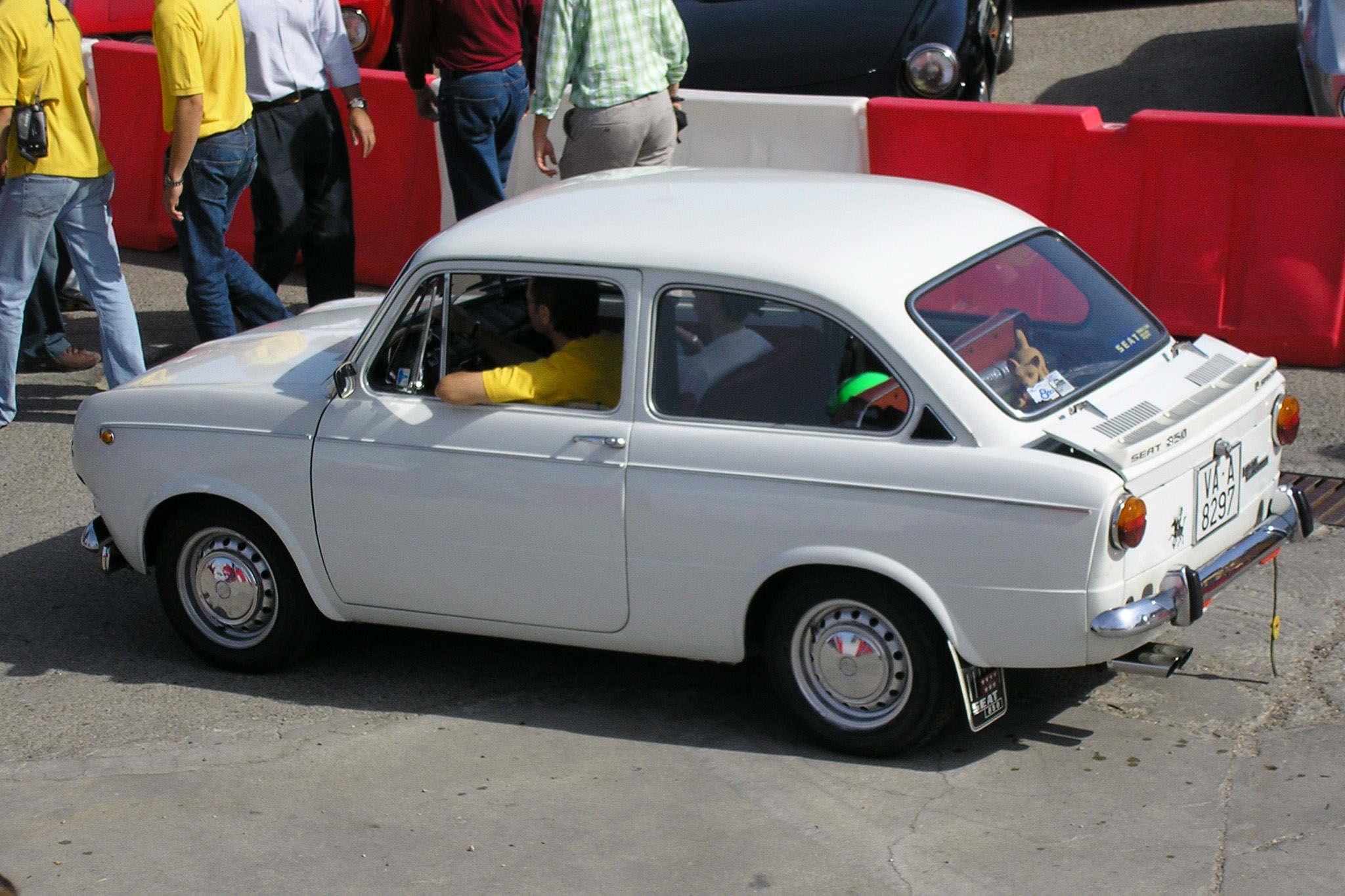 Seat 850 shown in Circuito del Jarama (Madrid). Jornada de puertas abiertas 2006.